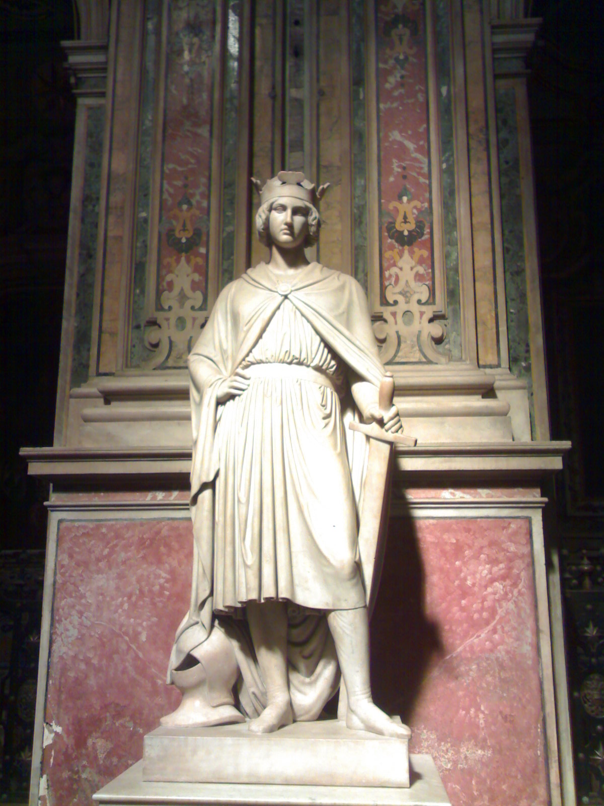 Chiesa del Carmine a Napoli. Monumento a Corradino di Svevia, realizzata da Pietro Schoepf su modello di Alberto Thorwaldsen.